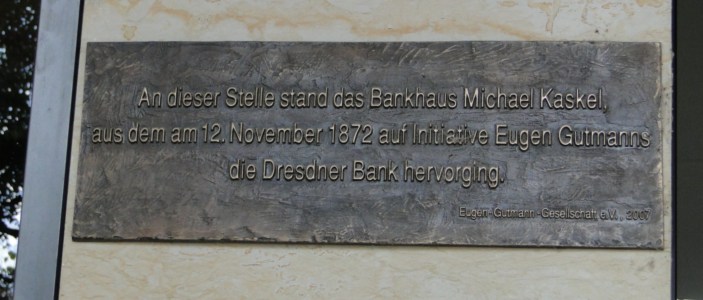 Tafel am Haus Wilsdruffer Straße 20 in Dresden in Erinnerung an das früher bestehende Gebäude des Bankhauses Kaskel, Vorgänger der Dresdner Bank